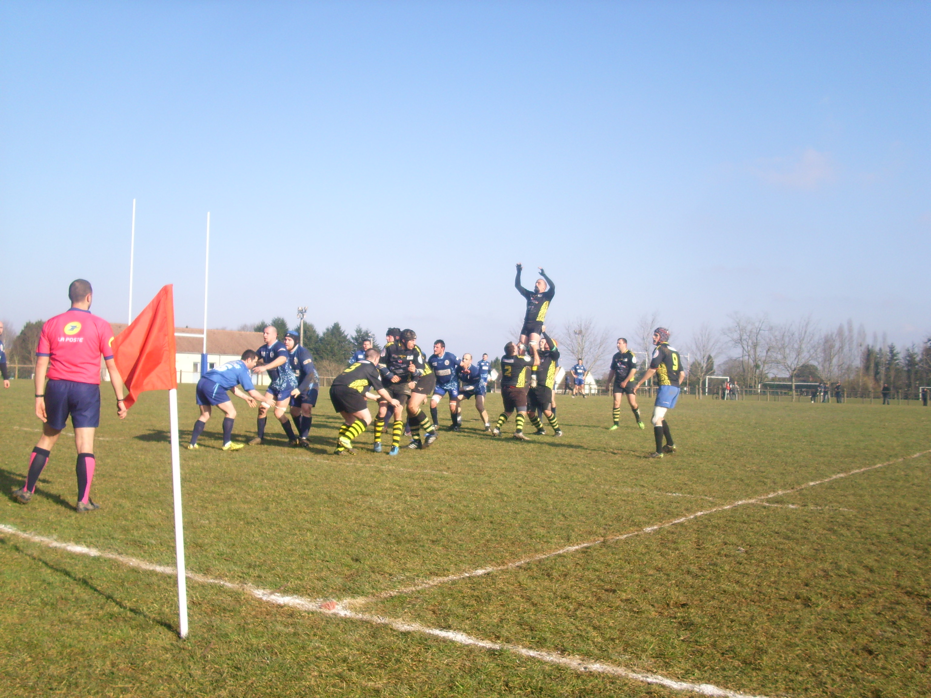 Match de rugby (niveau régionale) entre le RC Givry et Baumes les Dames à Givry (71)